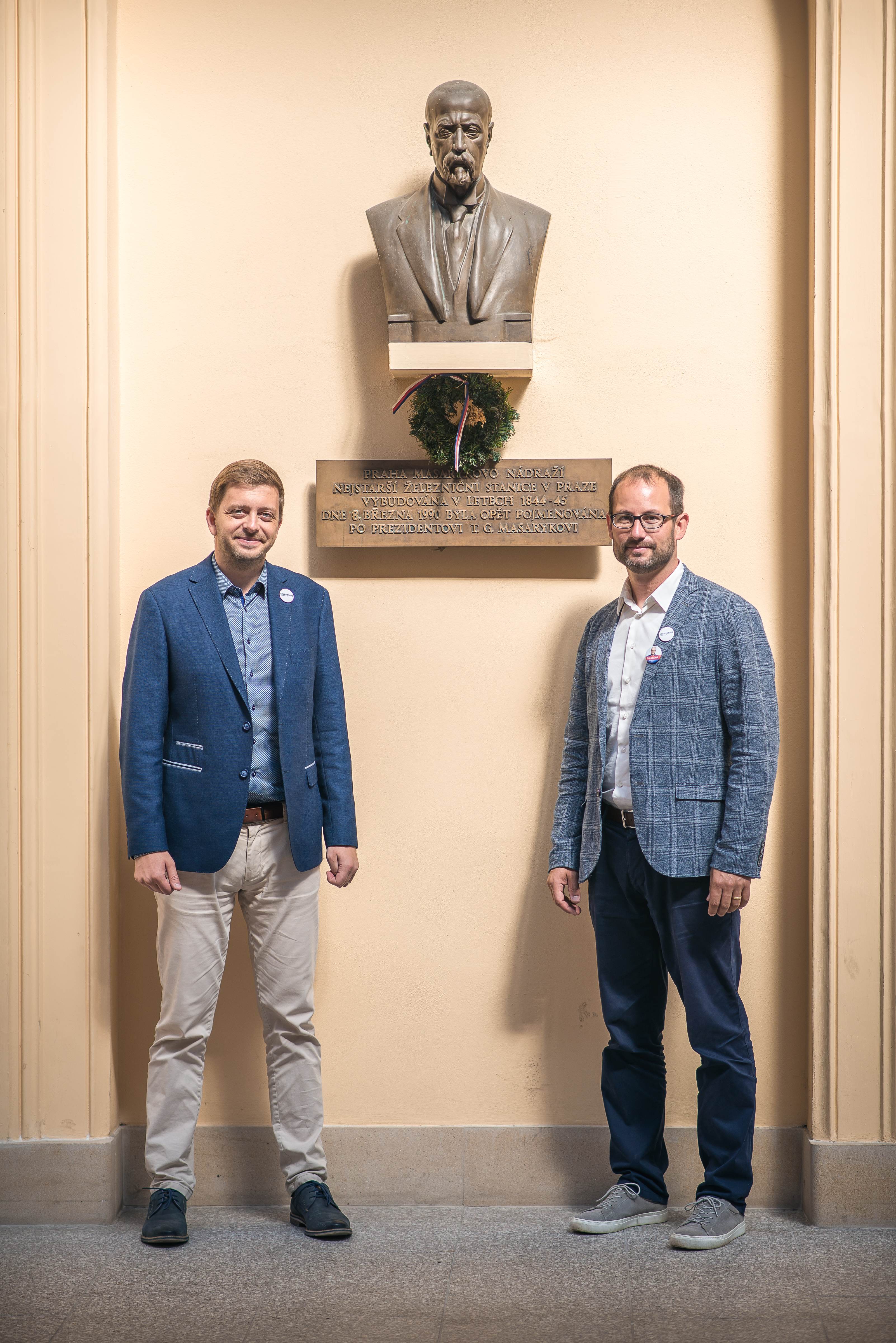 Vít Rakušan s Janem Farským, 2017, kampaň pro volby do Poslanecké sněmovny 2017.